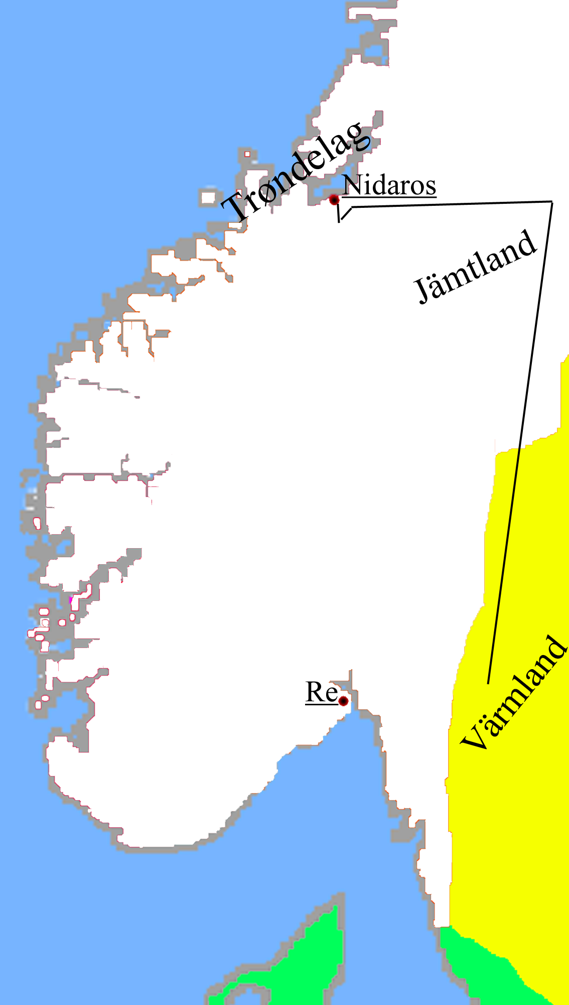 King Sverre Sigurdsson's journey from Värmland to Øreting in Nidaros.